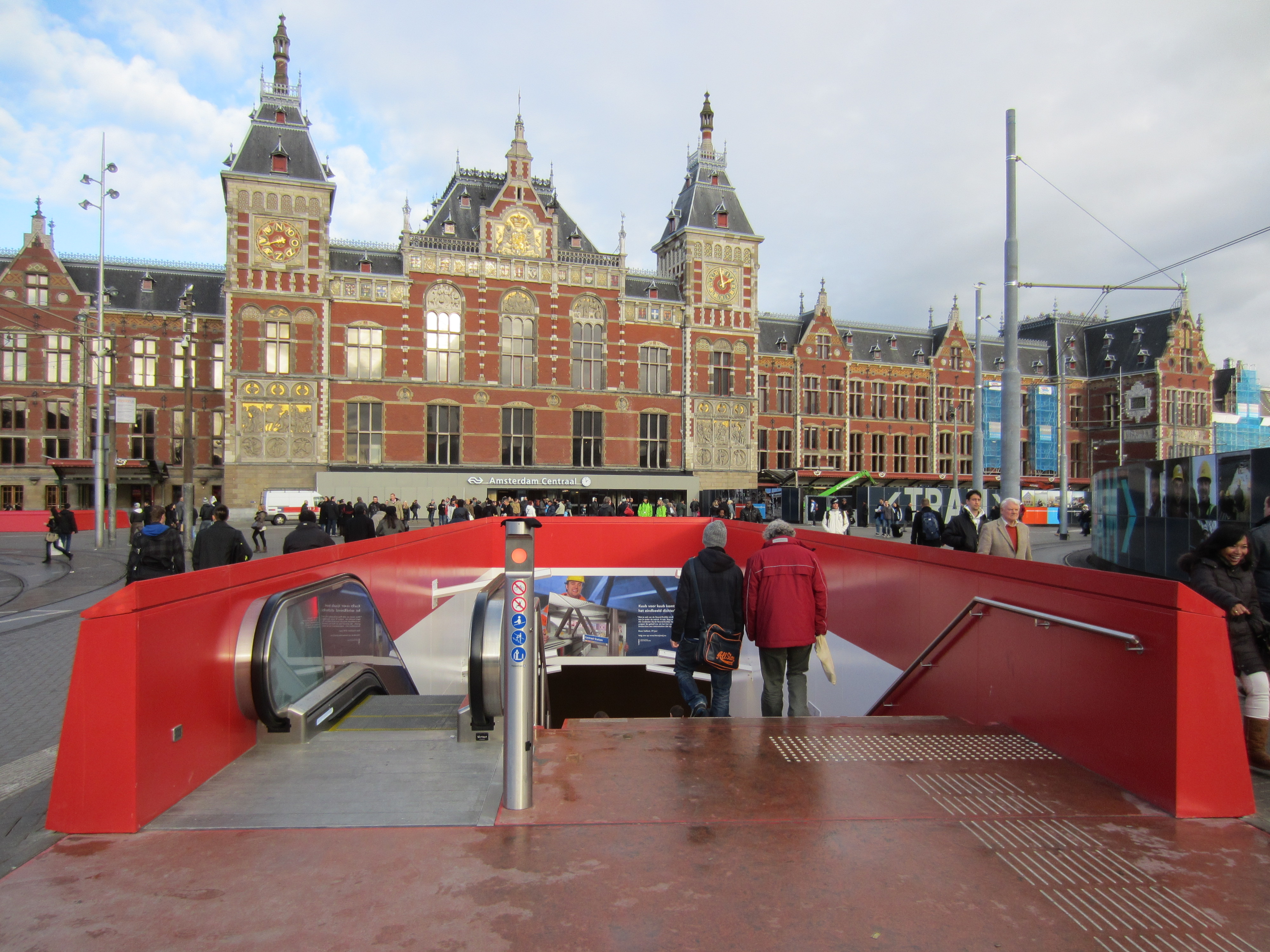 De nieuwe metroingang Damrak van het metrostation Centraal, geopend op 21 november 2011.